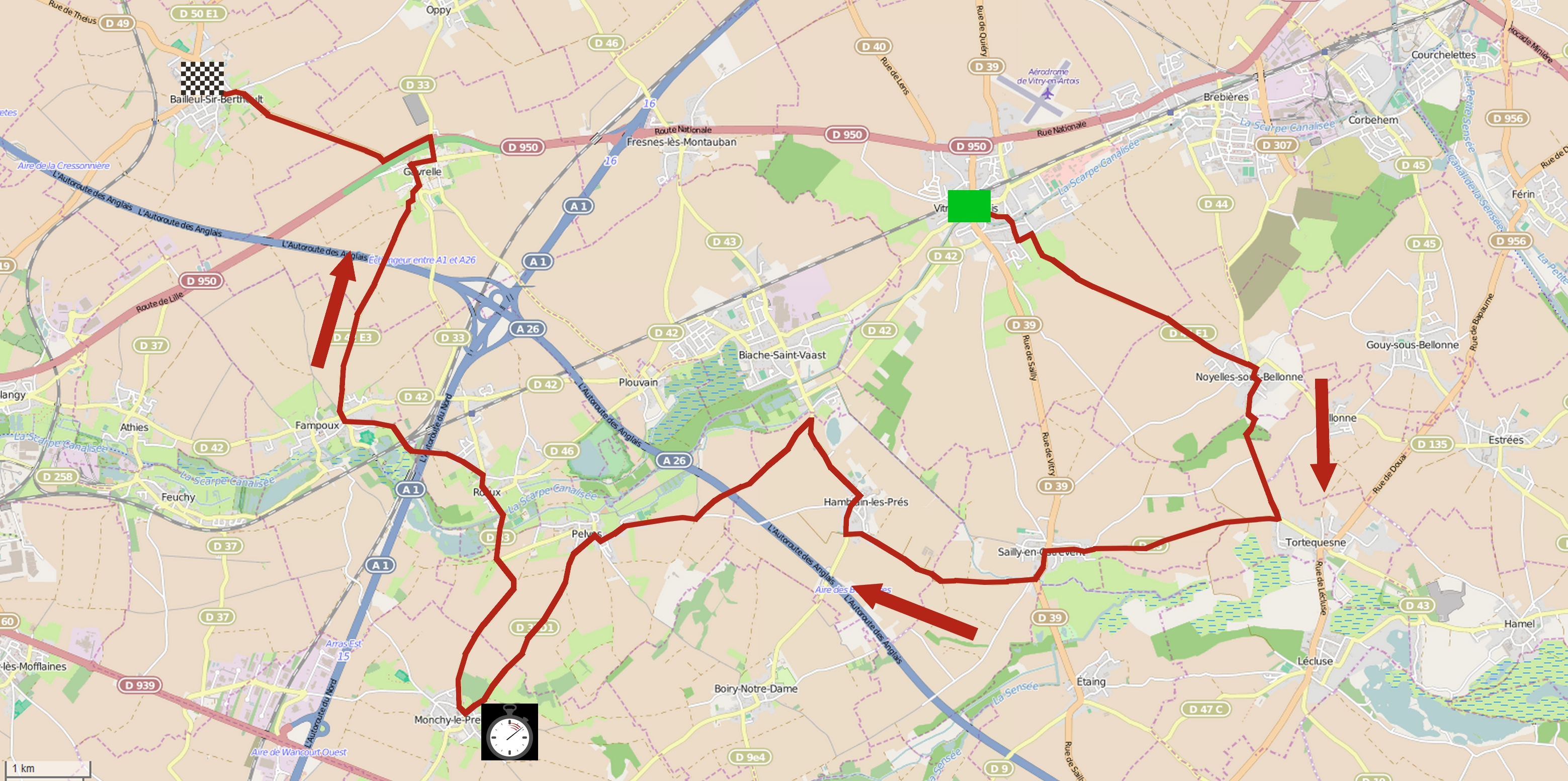 Parcours du contre-la-montre par équipes de la première étape du Paris-Arras Tour 2015. This map may be incomplete, and may contain errors. Don't rely solely on it for navigation.